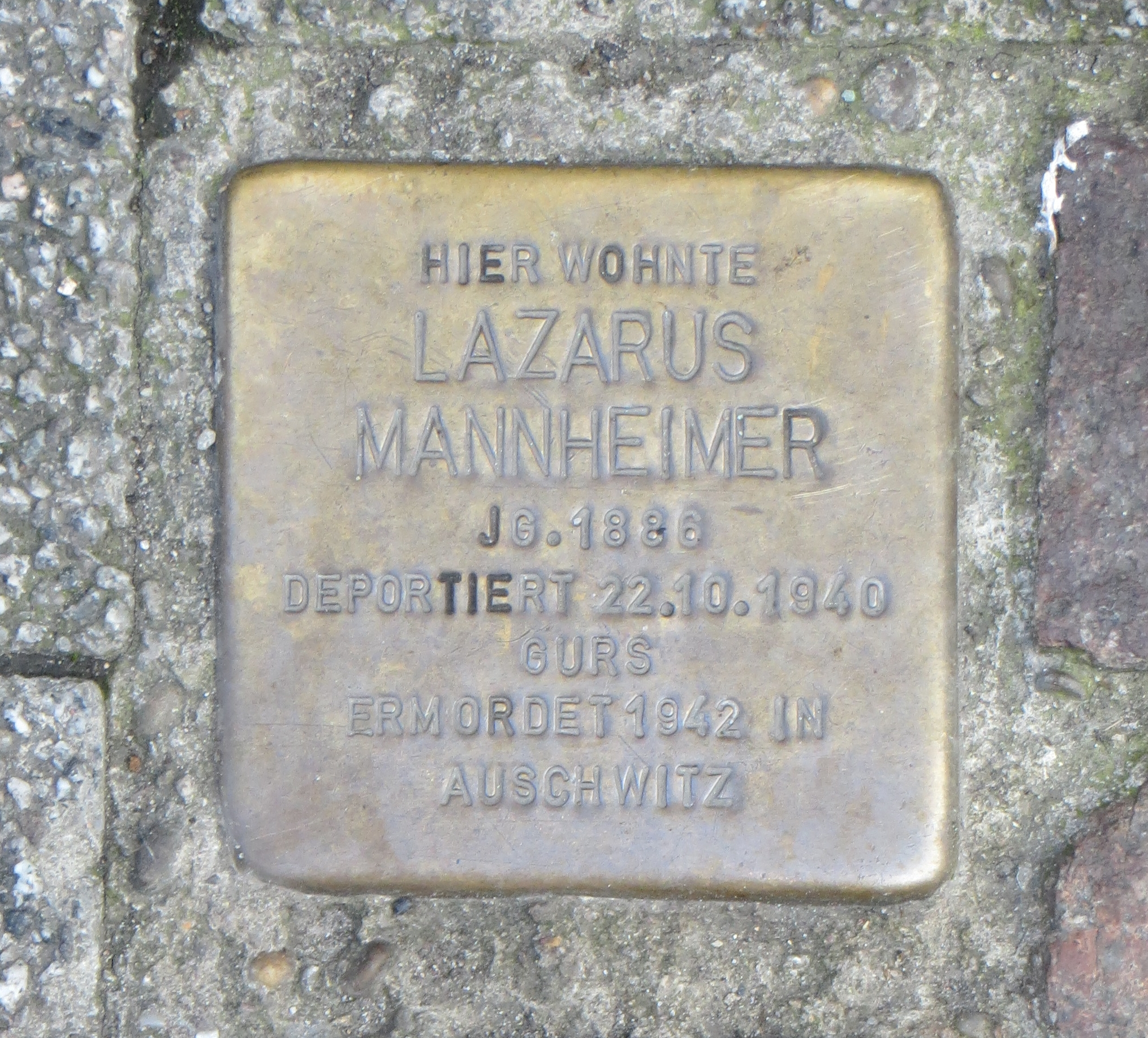 Stolperstein für Lazarus Mannheimer vor dem Haus Kreuzstraße 3 Karlsruhe